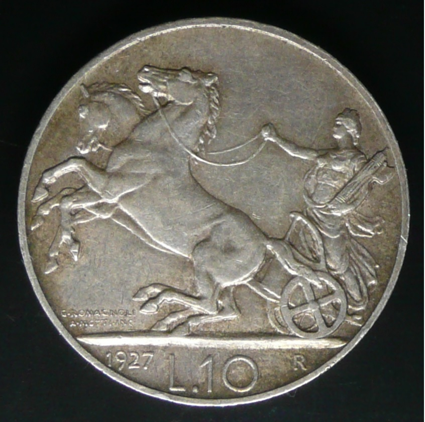 Moneta del Regno d'Italia da 10 lire 'Biga' del 1927, verso, che mostra la figura allegorica dell'Italia su una biga rivolta a sinistra, che tiene le redini con la mano destra ed un fascio littorio con il braccio sinistro. Sotto i cavalli il nome dell'autore del modello G.ROMAGNOLI e dell’incisore A.MOTTI INC. Il valore (L. 10) è in esergo, tra la data e il segno di zecca (R).